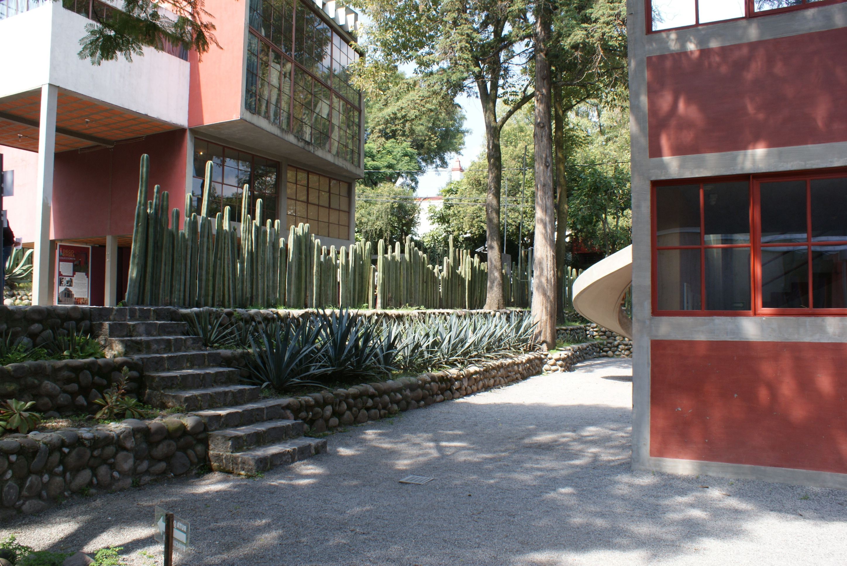 Barda de cactus que divide los terrenos entre las casas de Diego y Frida y la casa de Juan O'Gorman. Vista desde la parte posterior de la casa de Juan O'Gorman en el complejo Museo Casa Estudio Diego Rivera y Frida Kahlo.